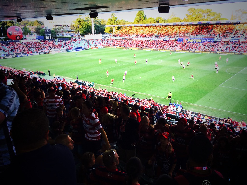 Western Sydney Wanderers Fans